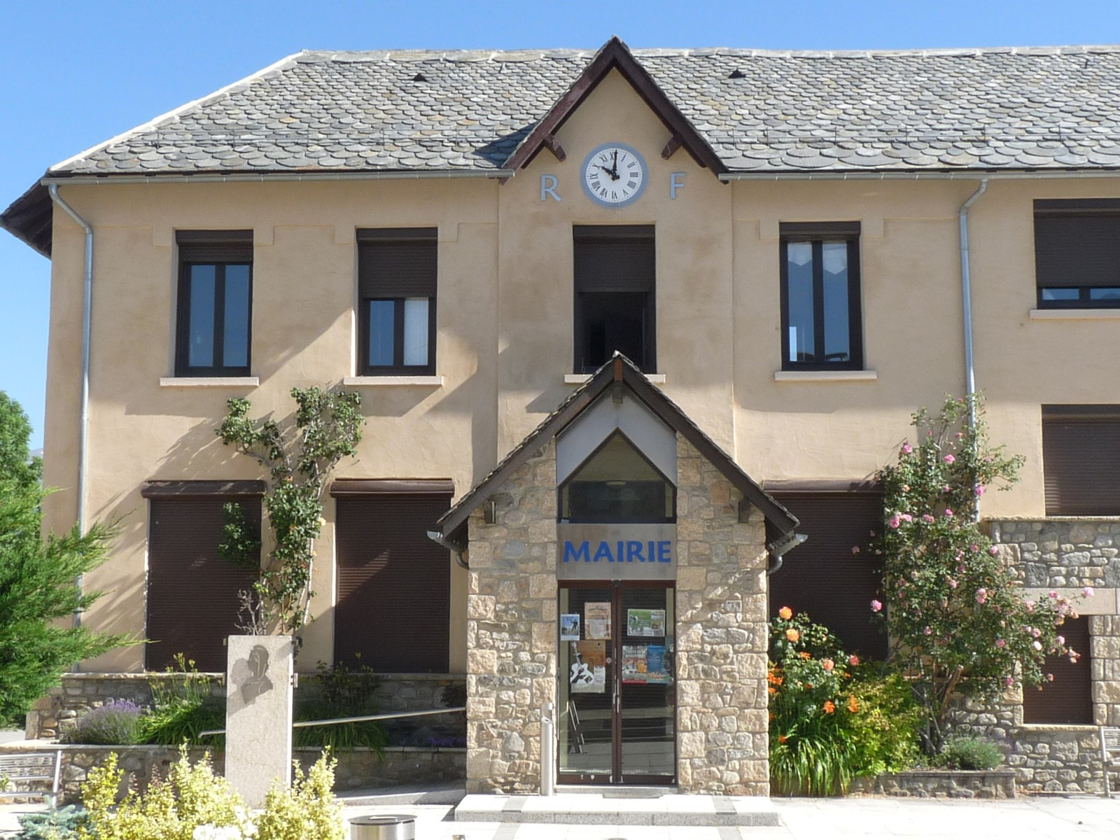 Mairie de Ste-Léocadie, Pyrénées-Orientales, France